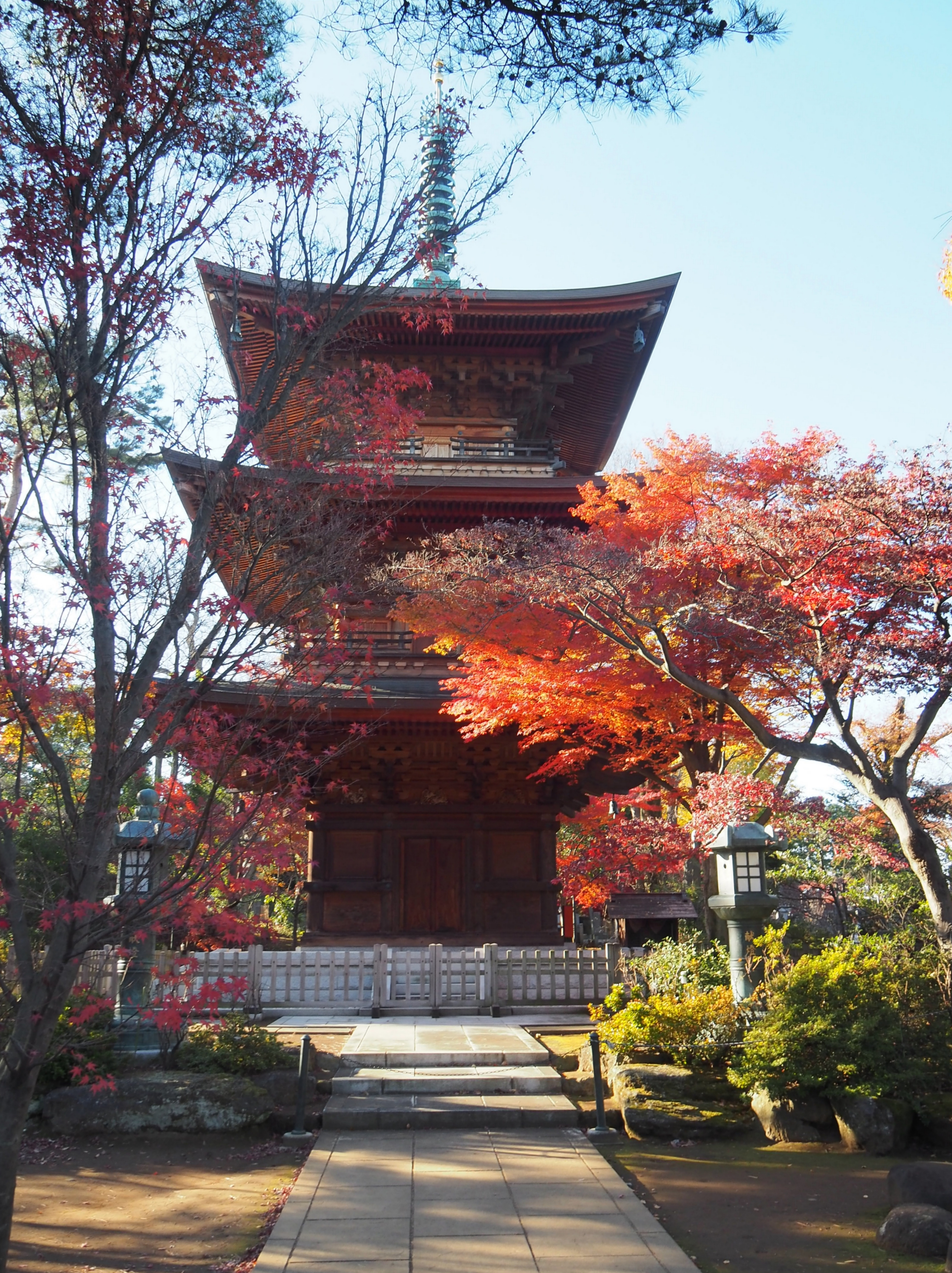 Gotokuji Temple